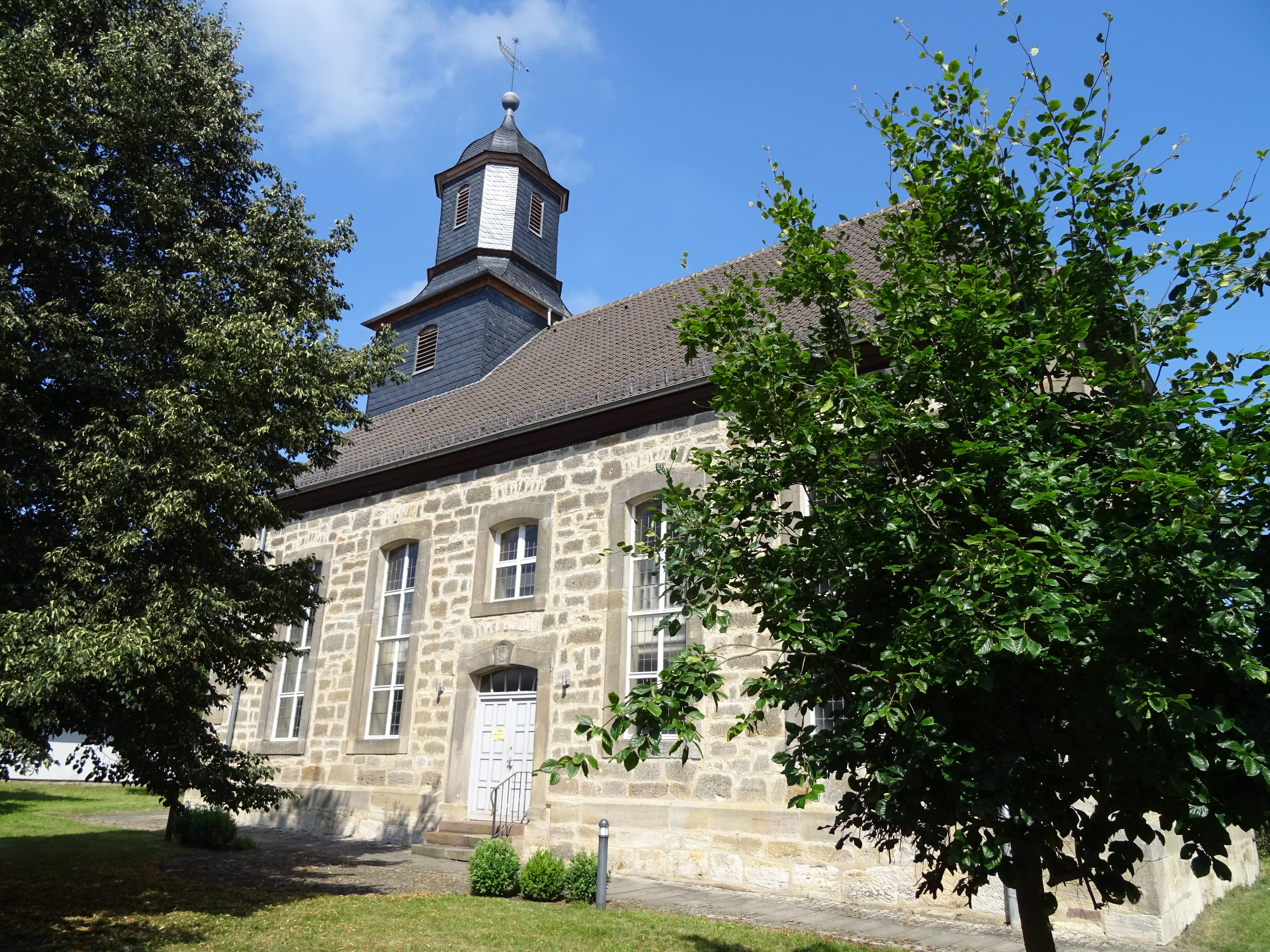 Seitenansicht